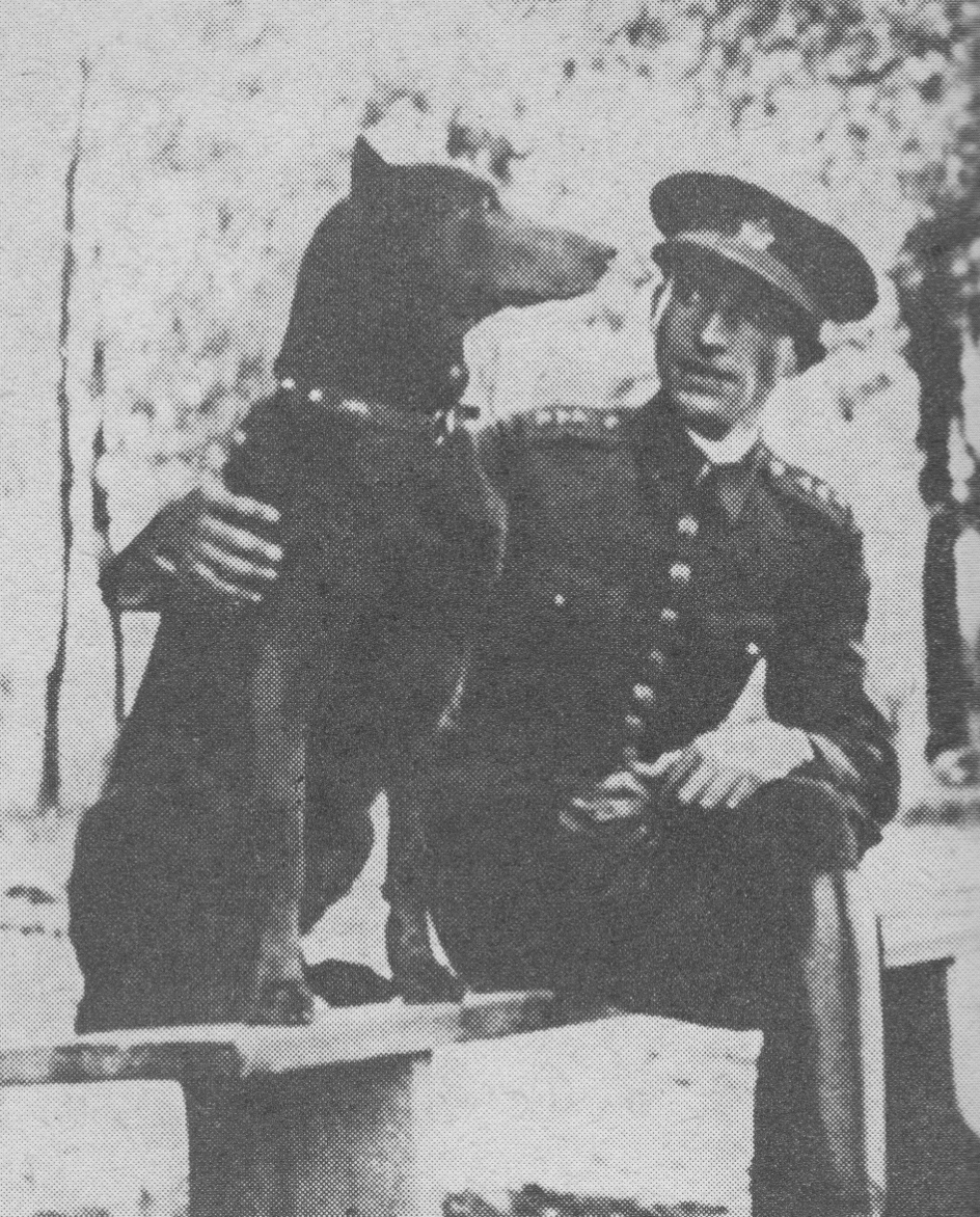 Člen odbojové skupiny "Tři králové" štábní kapitán Václav Morávek (* 8. srpna 1904, Kolín – † 21. března 1942, Praha) na fotografii se psem. Fotografie pochází z osobních památek spolupracovnice odbojové skupiny Tři Králové - Marie Magdy Rezkové (* 21. srpna 1895 ve Vlkově - † 25. června 1982 v Nechanicích). Fotografie datovaná před rok 1942. Autor fotografie není znám.